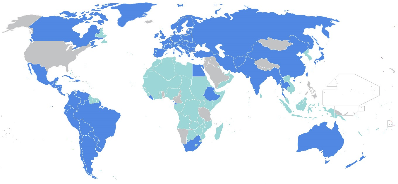 Ліга.jpg: Карта Ліги Націй Держави, які були членами Ліги Націй Держави, які були колоніями Ліги Націй Держави, які не були членами Ліги Націй